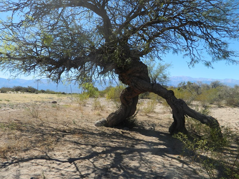 Cuenta la leyenda que un poblador de la localidad de la Banda (distrito de Vinchina) se dirigía de noche hacia el pueblo, cuando se repente vio un luz perderse entre los árboles, en ese momento recordó lo que había escuchado por años, que se trataba del entierro de un tesoro en oro y plata y la luz le estaba indicando el lugar exacto donde encontrarlo. Sin perder tiempo ato a dos pequeños algarrobos como señal para regresar por su fortuna, se cuenta que jamás volvió y los arboles aún permanecen unidos, se los conoce como los arboles enamorados.